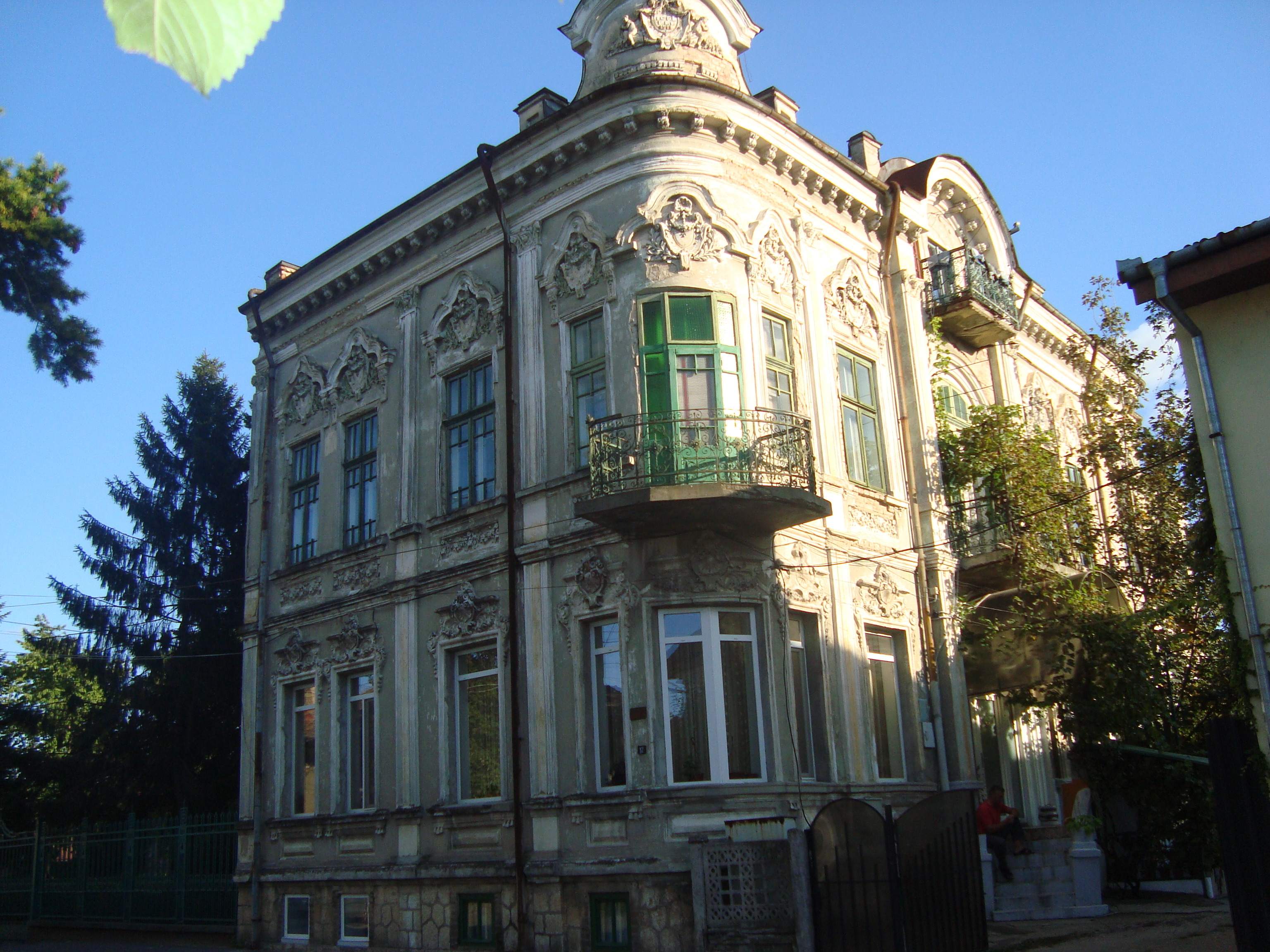 Casa Buga Mihaela 1911, Bd. Carol I nr.12 (lângă Tribunal), Drobeta Turnu Severin